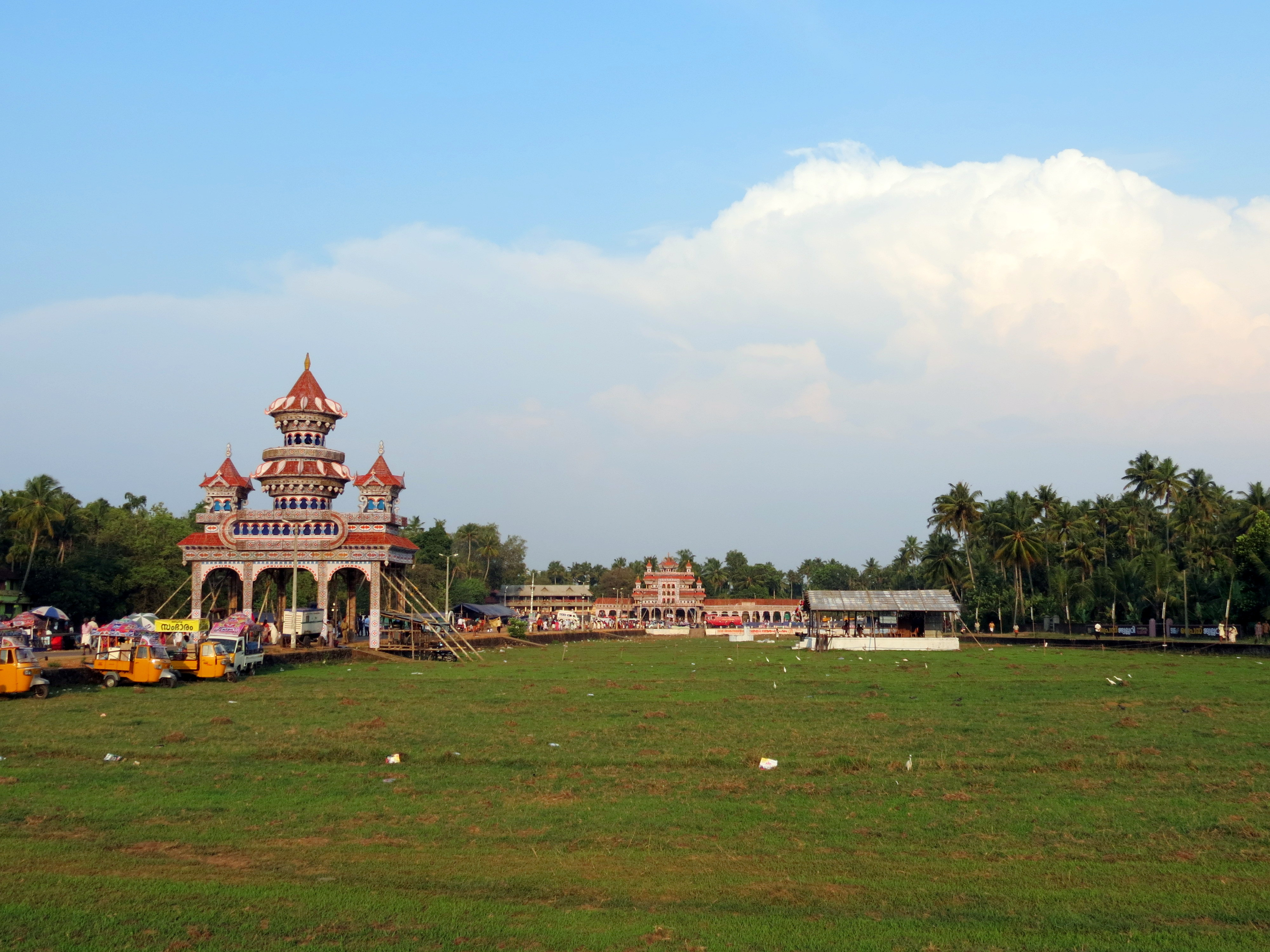 2013 Arattupuzha Pooram views